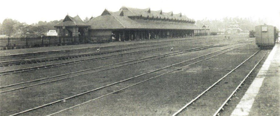 1904-ൽ ഉദ്ഘാടനം ചെയ്ത കൊല്ലം തീവണ്ടി സ്റ്റേഷൻ